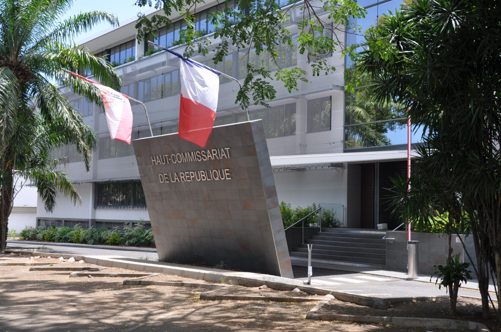 Haut- commissariat à Papeete